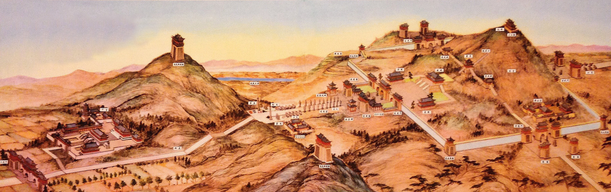 Troligt utseende av Qianling